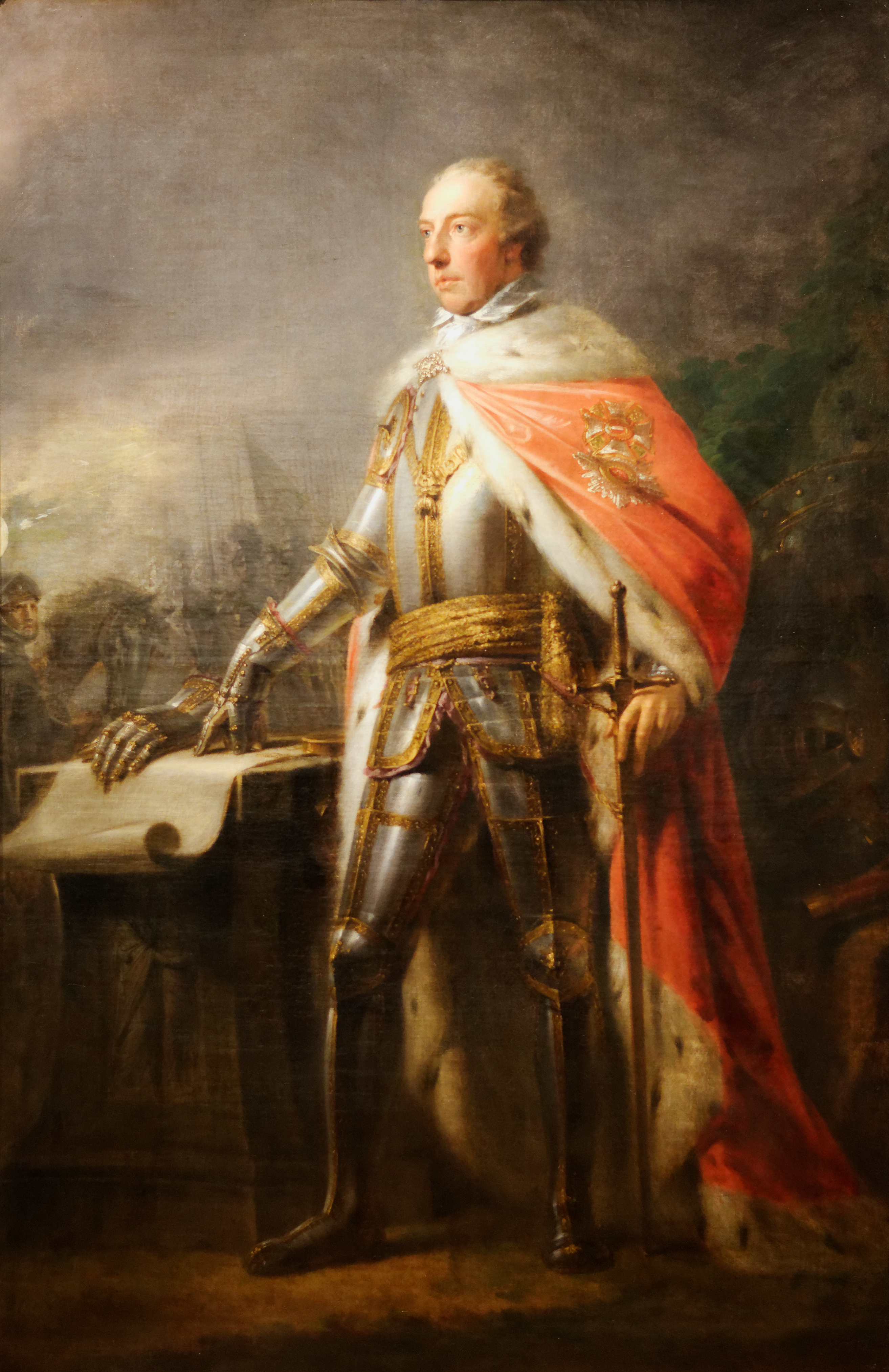 Joseph II du Saint-Empire